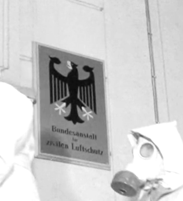 Behördenschild der Bundesanstalt für zivilen Luftschutz